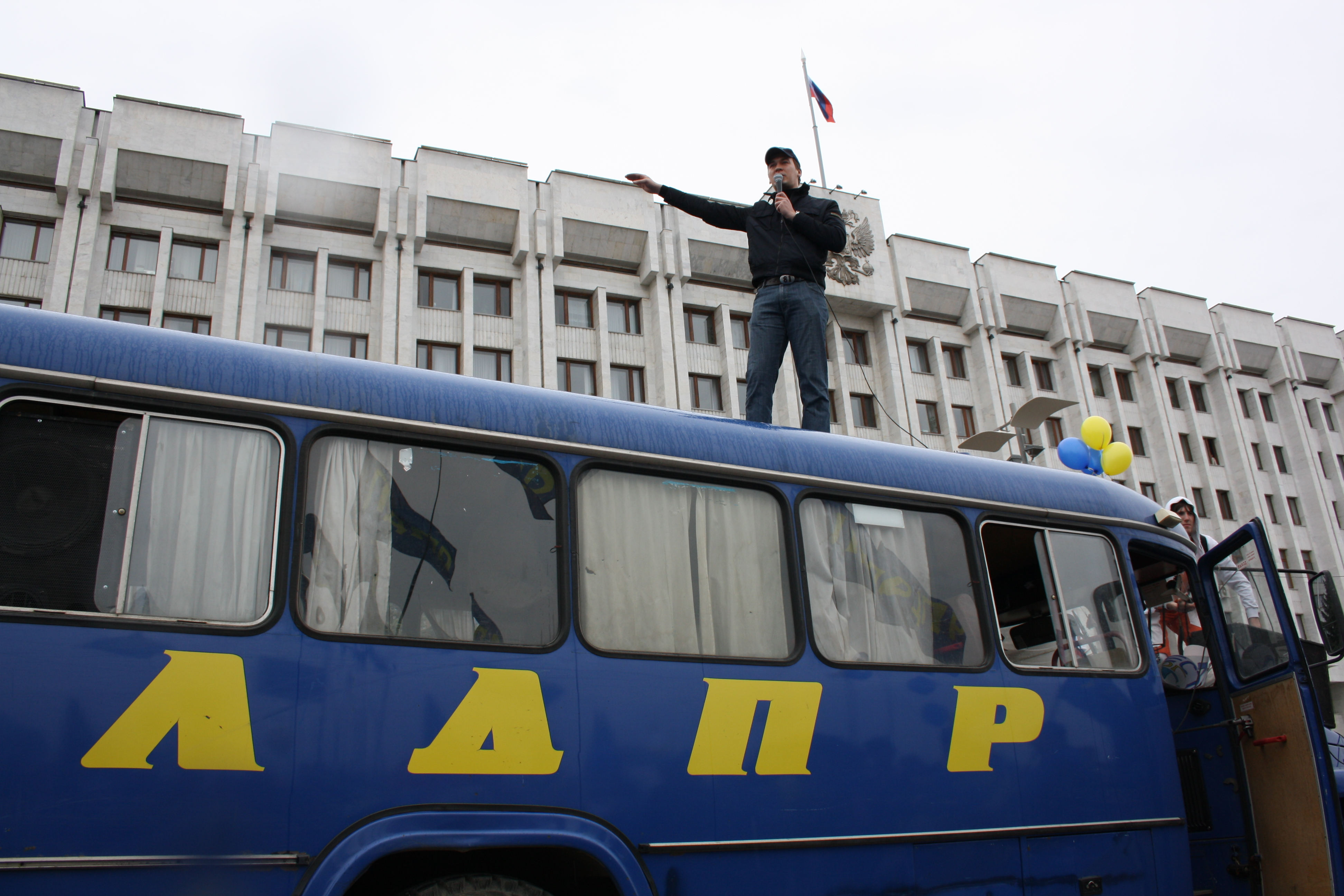 Митинг ЛДПР перед зданием правительства Самарской области